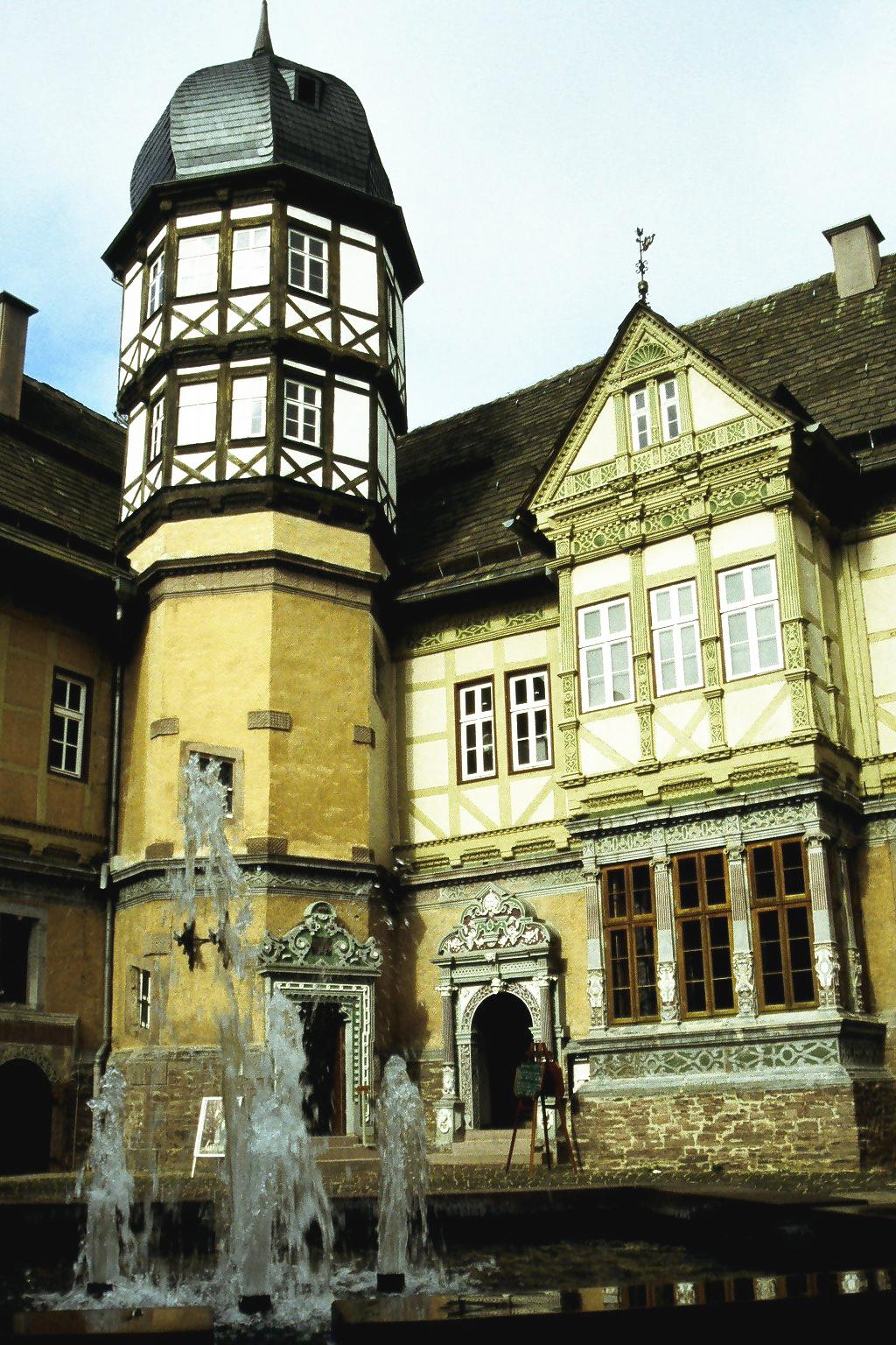 Weserrenaissance-Schloss Bevern, Ecke des Innenhofes mut Treppenturm